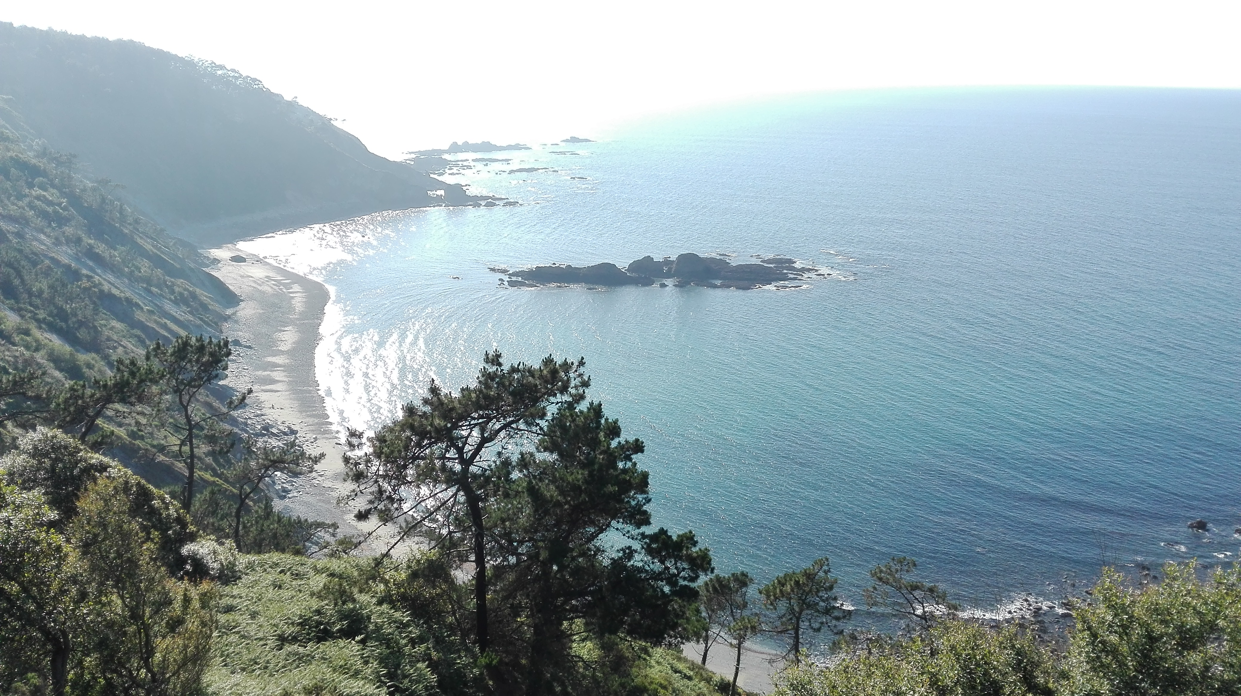 De Cabo Busto a Luanco es una zona amplia de costa de Asturias. Desde la senda costera desde Muros de Nalón se pueden ver varias playas como la de las Xanas o la Playa de Cazonera This is a photography of a Special Area of Conservation in Spain with the ID: ES1200055. Natura2000 entry, EEA entry